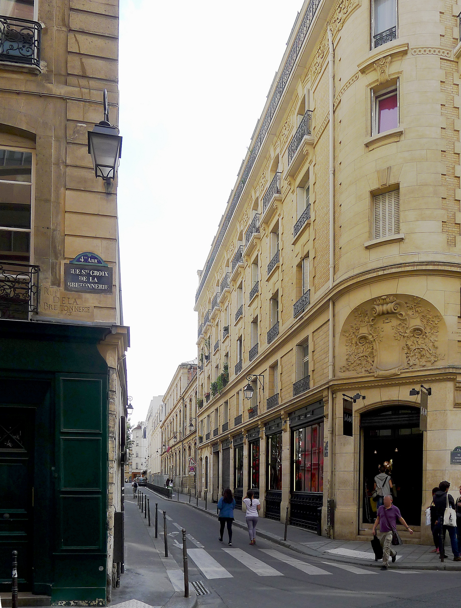 Rue de Moussy - Paris IV